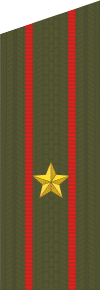 Погоны майора сухопутных войск РФ